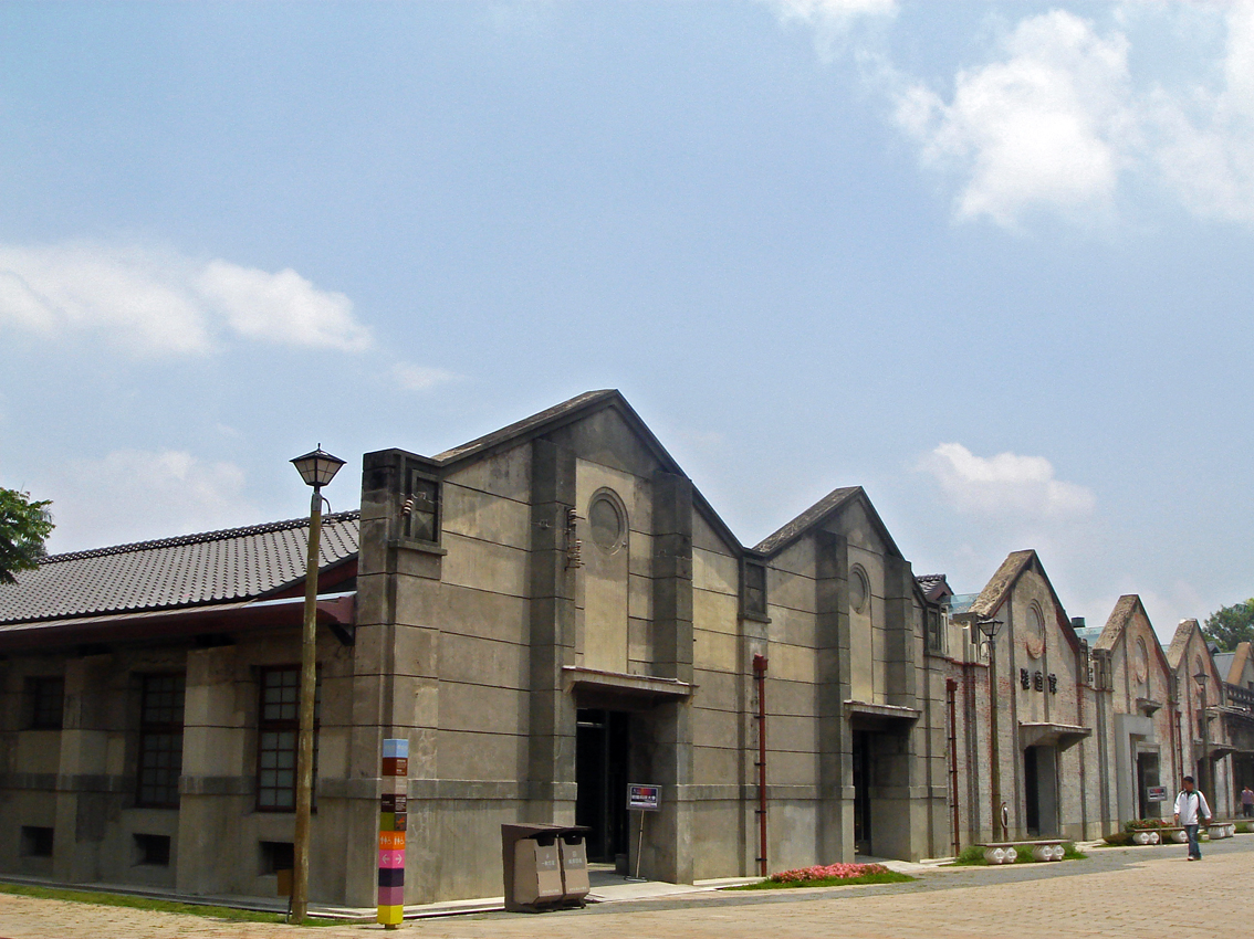 舊台中酒廠。